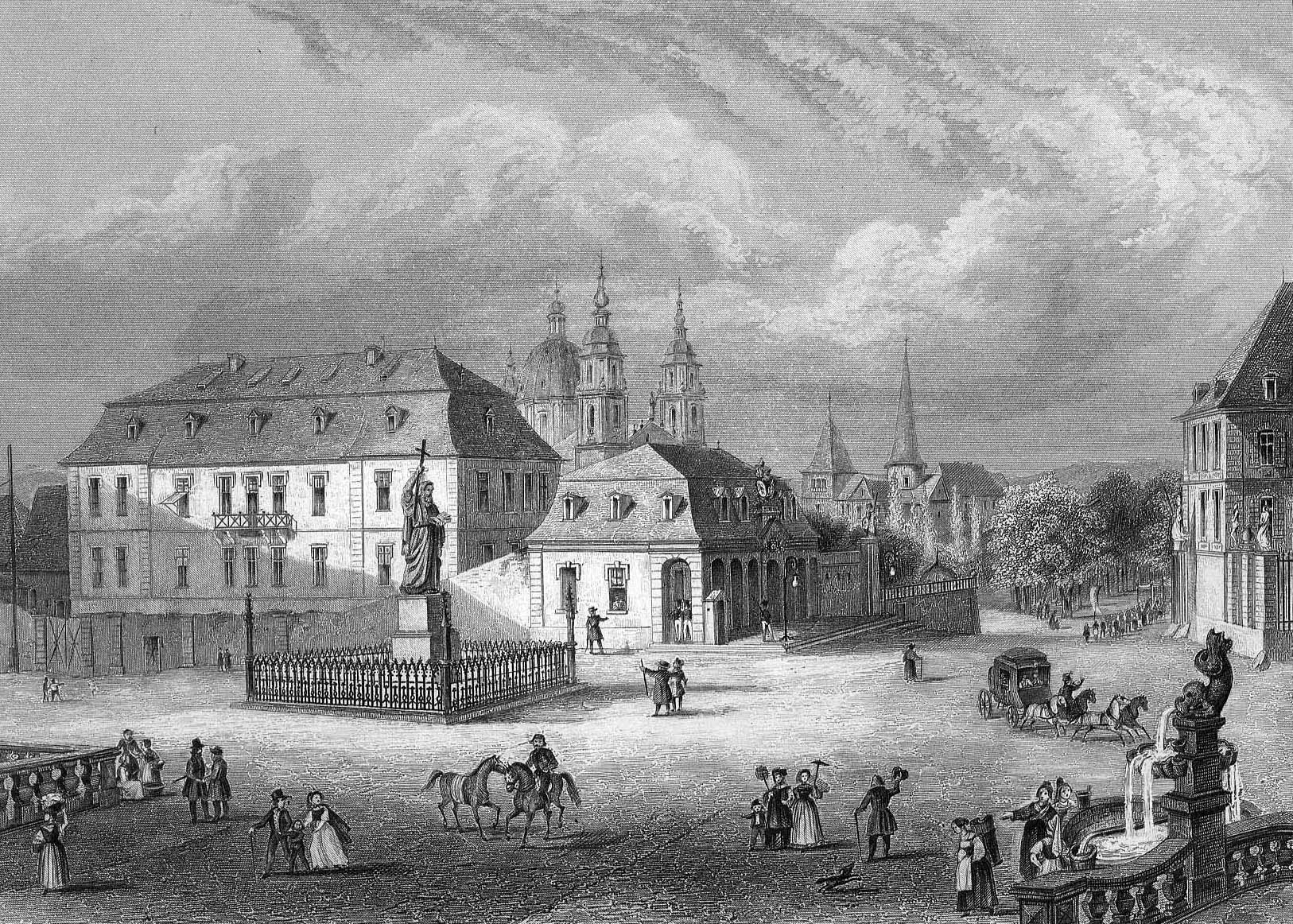 Ansicht des Bonifatiusplatzes mit Bonifatiusdenkmal und Hauptwache in Fulda, 1850